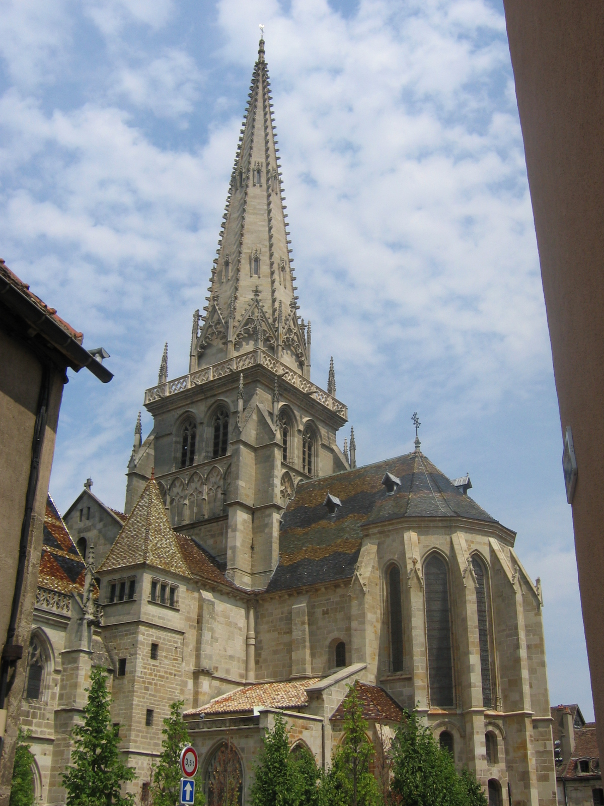 Cathédrale d'Autun, France. Chevet.